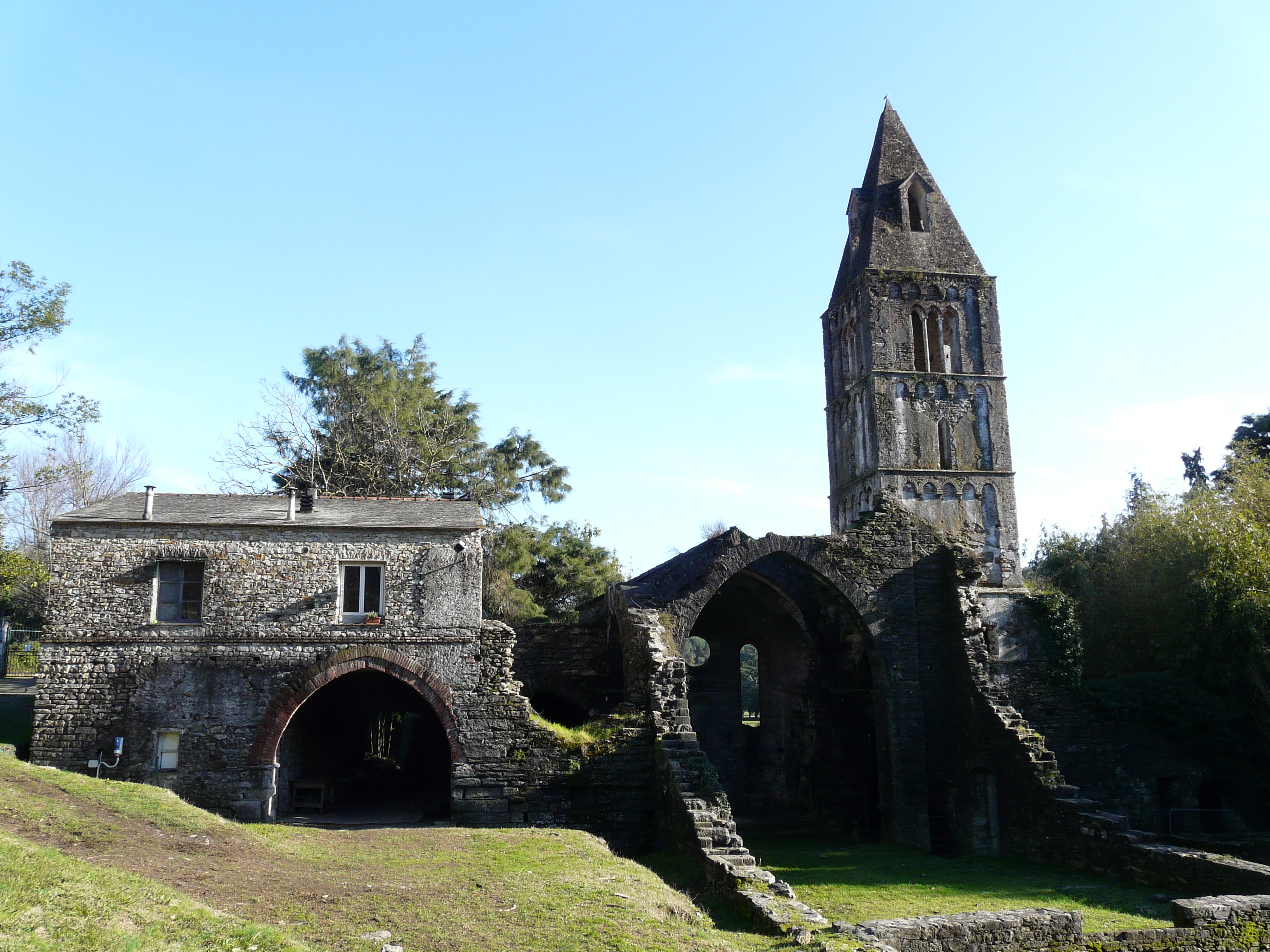 Ruderi dell'antico complesso monastico di Valle Christi del XIII secolo presso Rapallo, Liguria, Italia